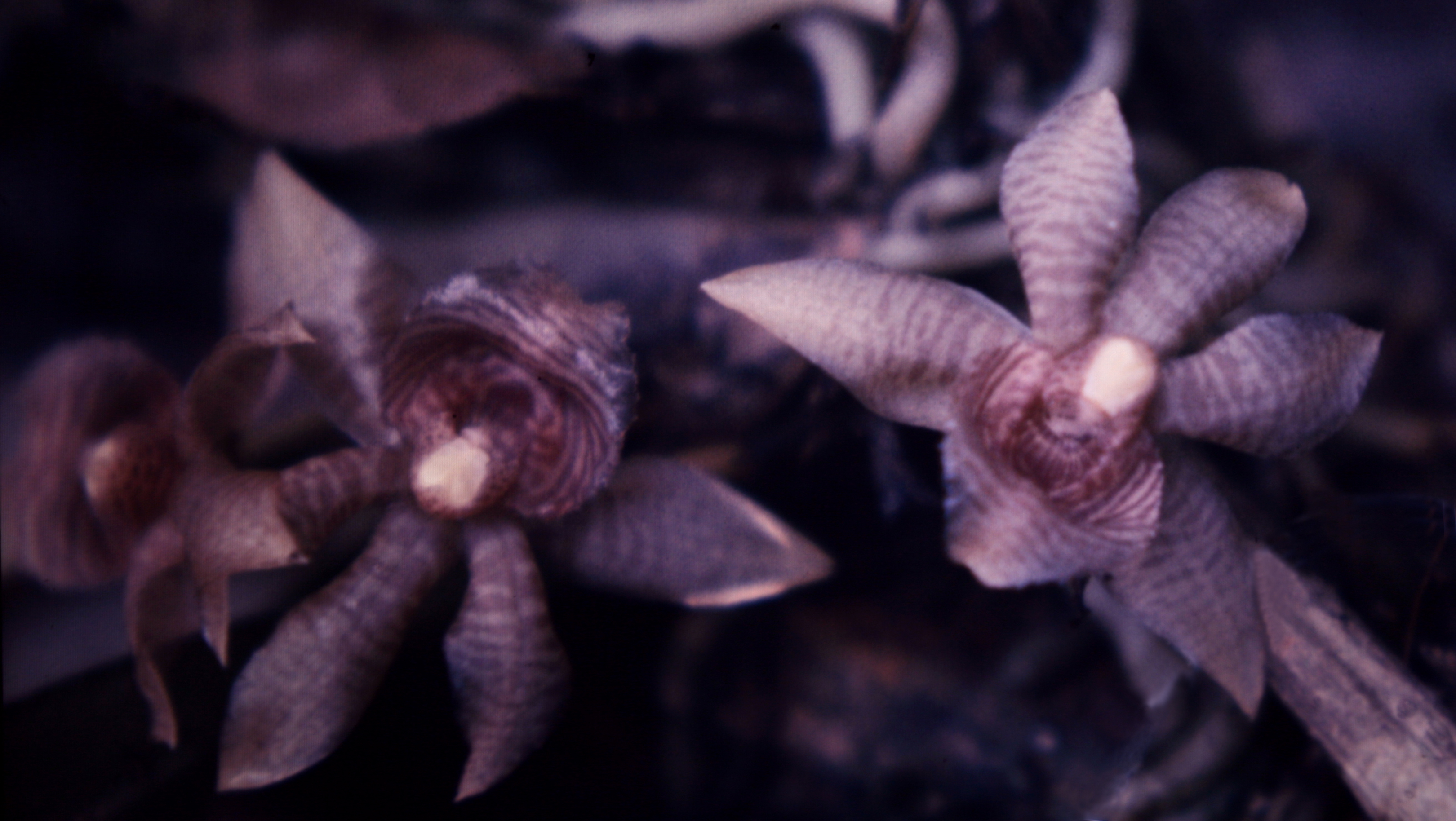 Chaubardiella tigrina, Suriname.